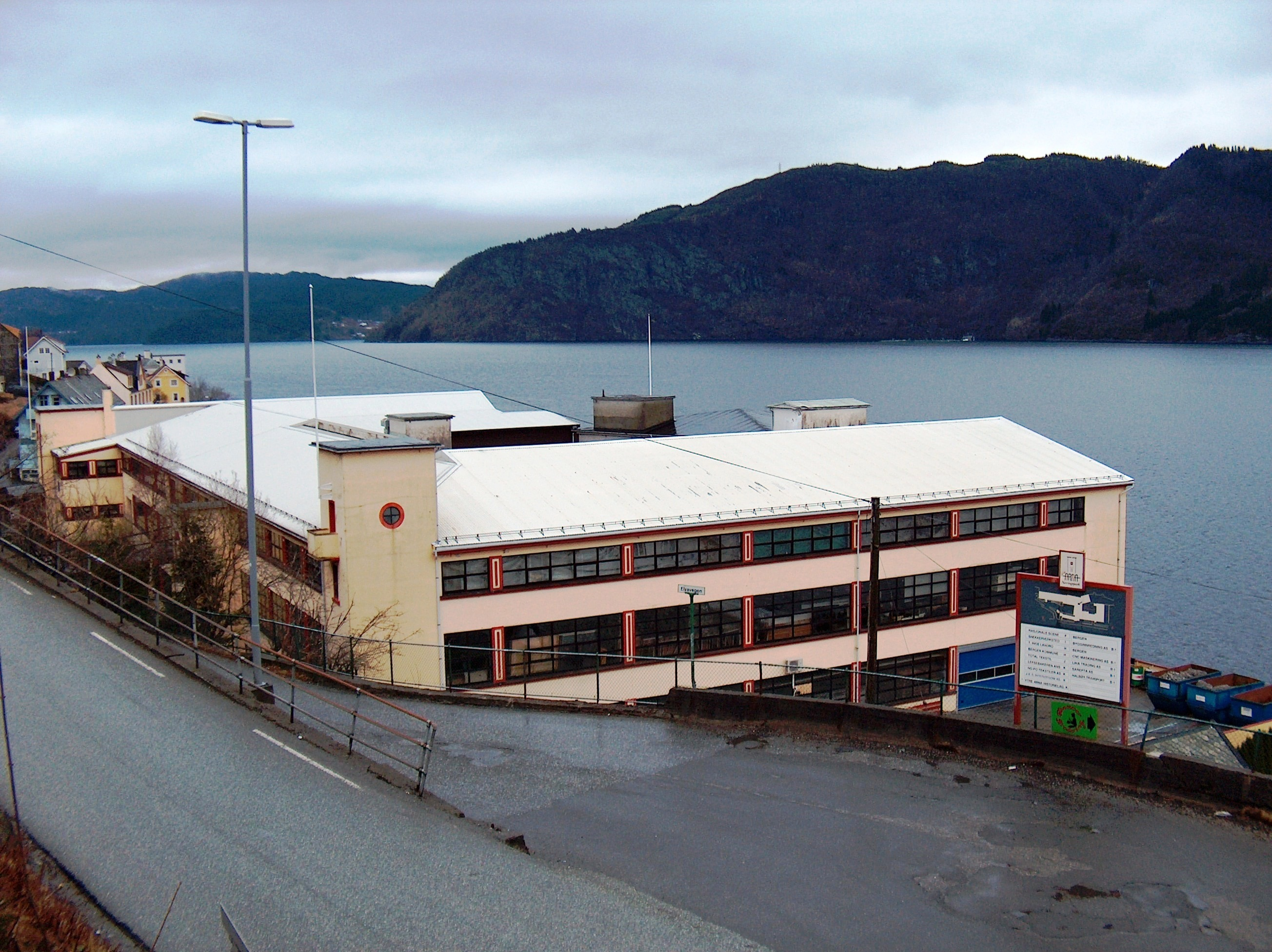 Arna Næringspark